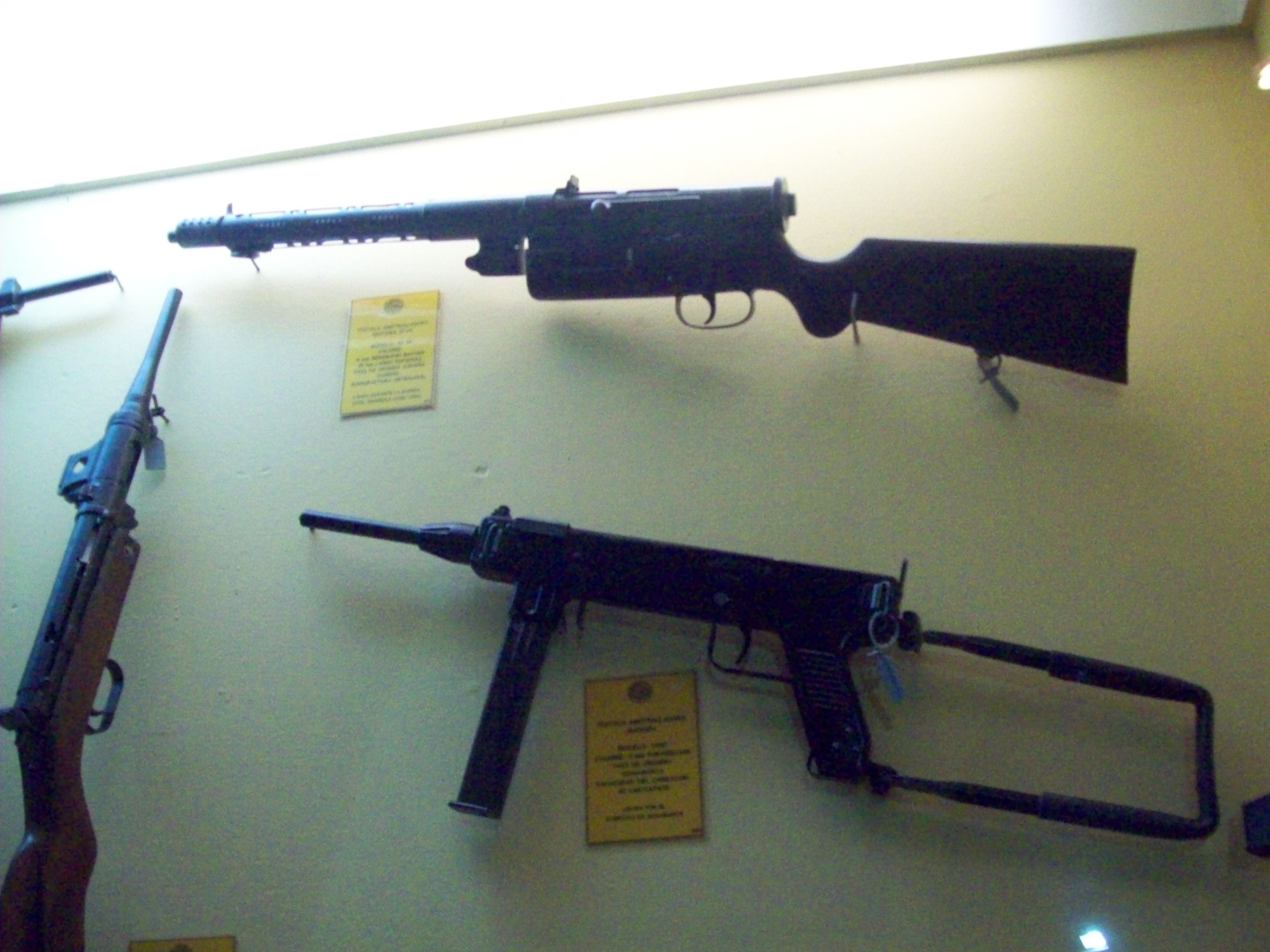 Armamento expuesto en el Museo de Armas de la Nación, ciudad de Buenos Aires, Argentina 2014.